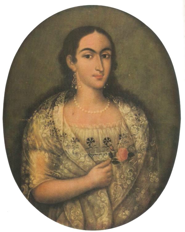 Retrato de Mariana de Carcelén de Guevara y Larrea-Zurbano, Vii marquesa de Solanda y VI de Villarocha. Óleo sobre tela de 1827, obra atribuida al pintor quiteño Diego de Benalcázar.